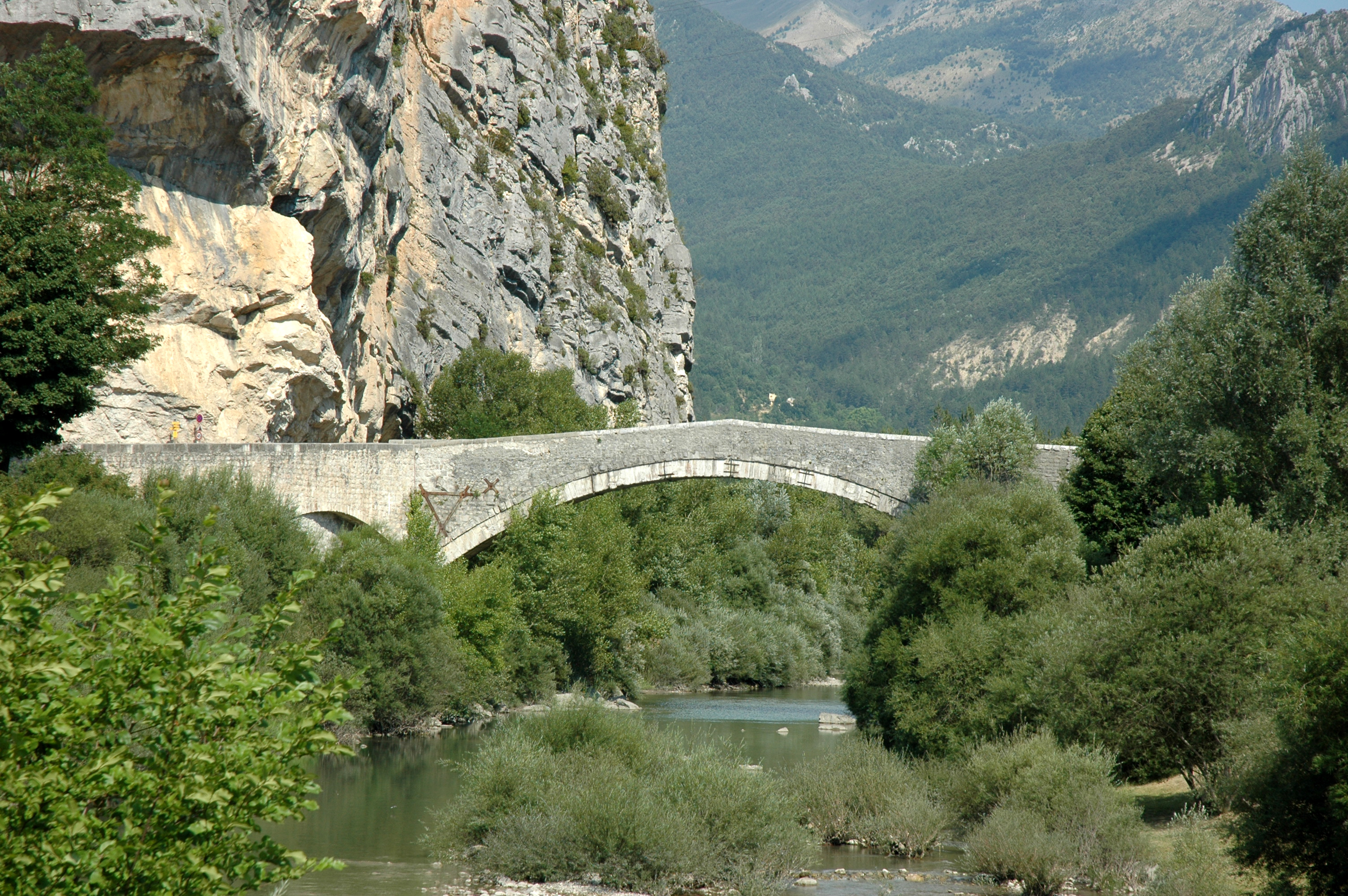 Pont du Roc (Castellane)